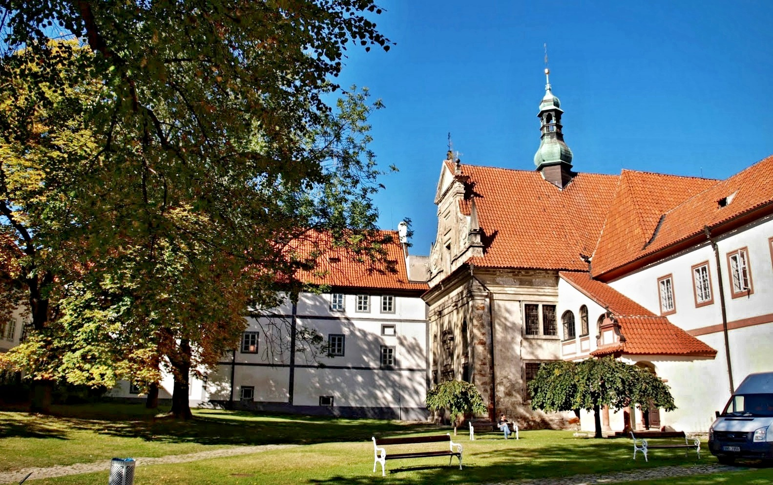 Český Krumlov, minoritský klášter